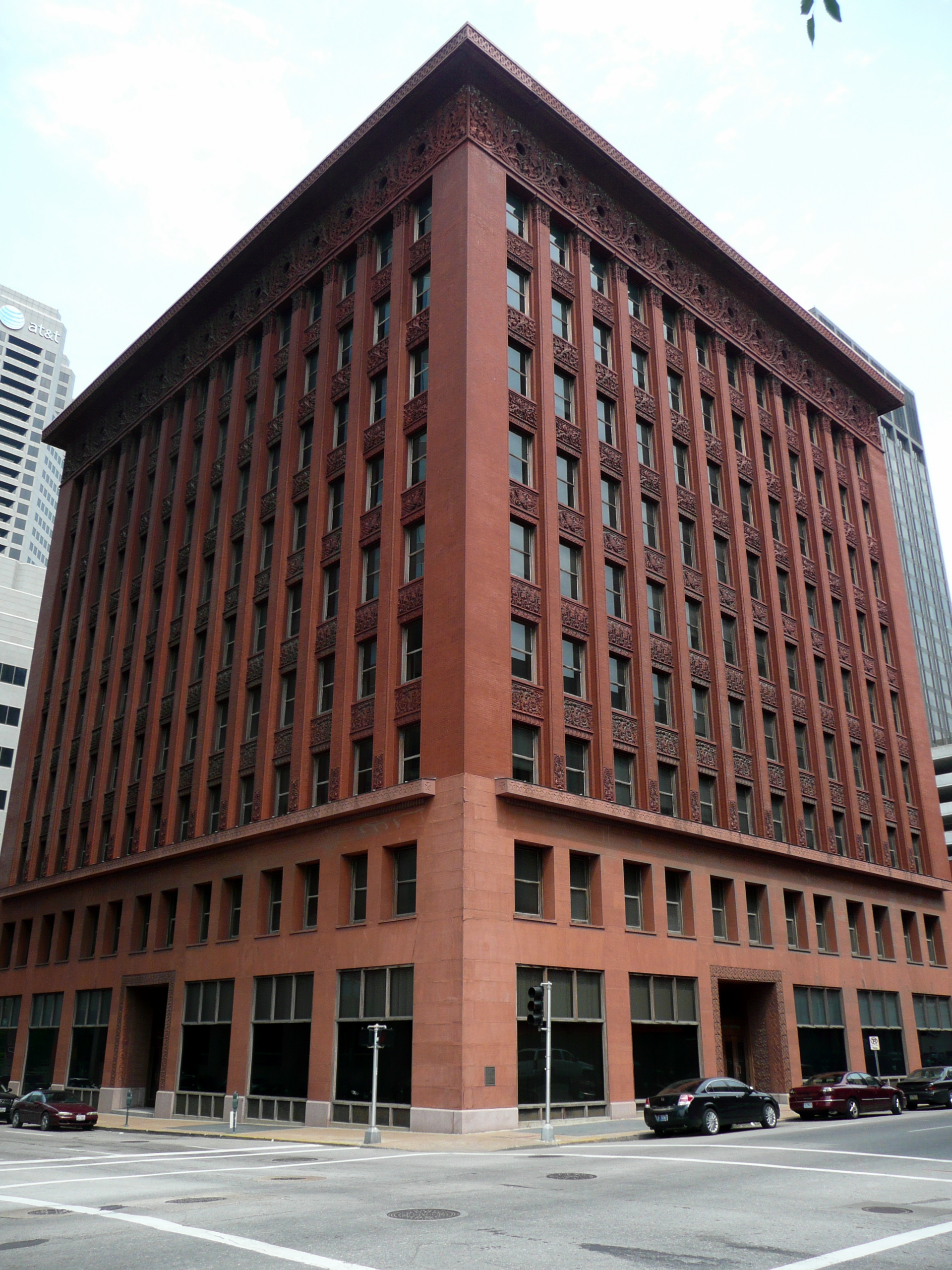 Louis Sullivan, architecte, The Wainwright Building